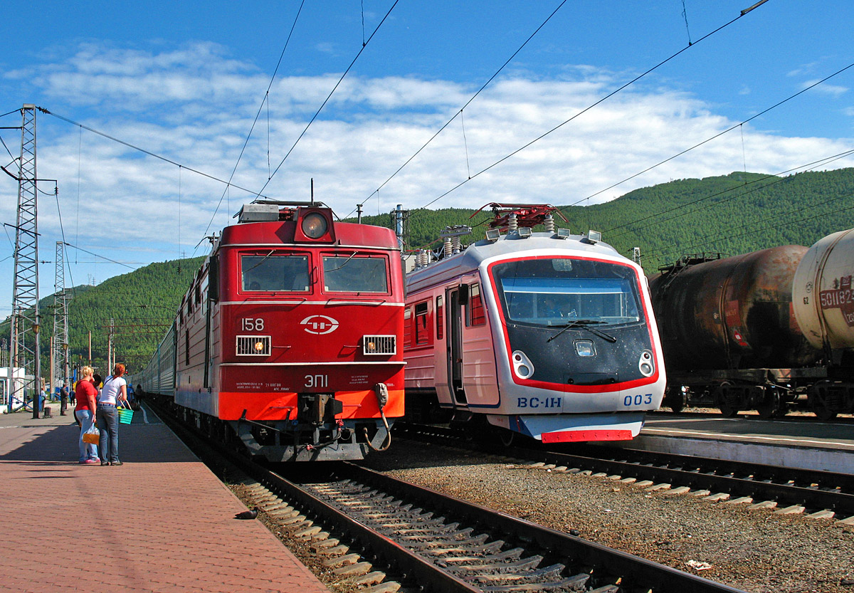 Электровоз ЭП1-158 и электромотриса ВС1Н-003 Россия, Иркутская область, станция Слюдянка-I